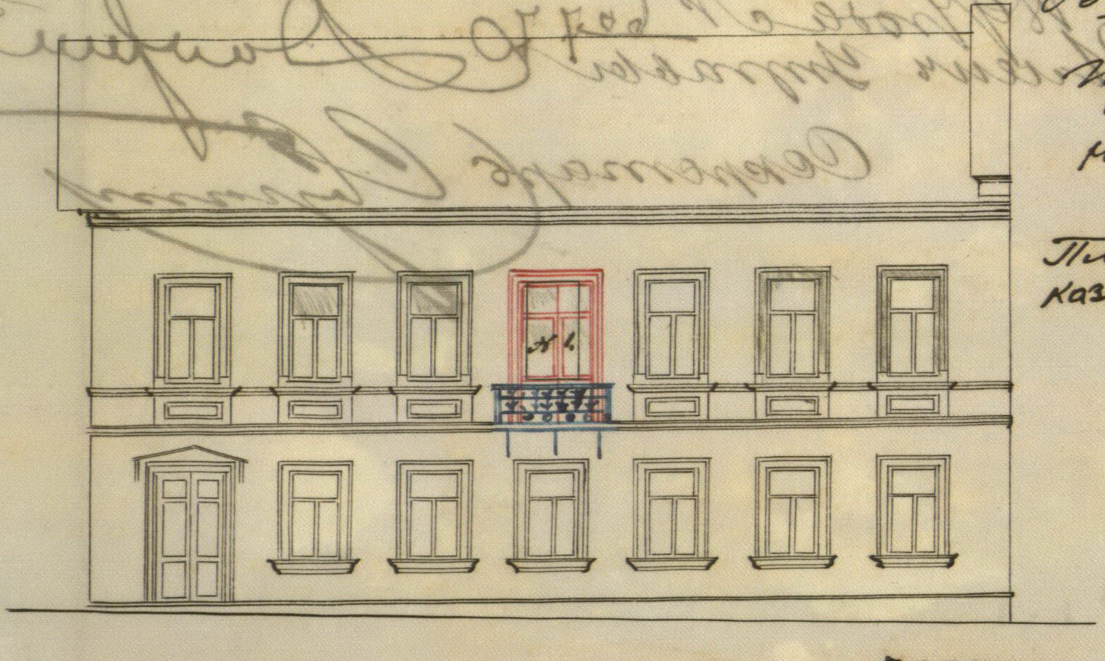 Беларуская (тарашкевіца): Менск (Miensk), вуліца Койданаўская (vulica Kojdanaŭskaja). Дом Каплана (Kapłan)